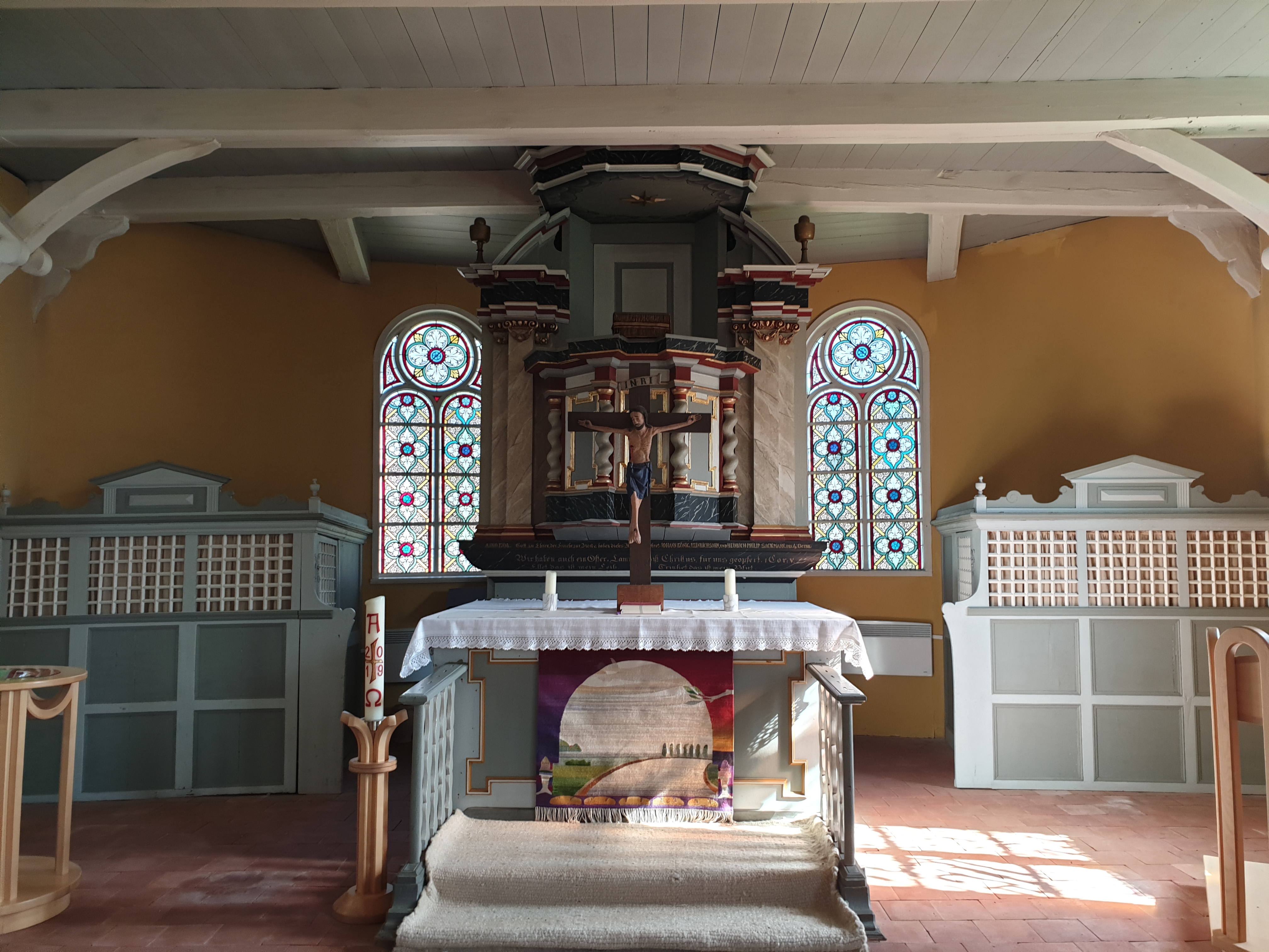 Altarraum der Kirche in Großenwörden an der Oste, Landkreis Stade, Nds.